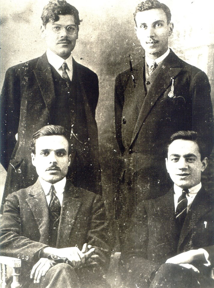 Photo réalisée en 1926 à Paris. On y voit Habib Bourguiba et A. Alolou assis, Tahar Sfar et Bahri Guiga debout, pendant leurs études à Paris